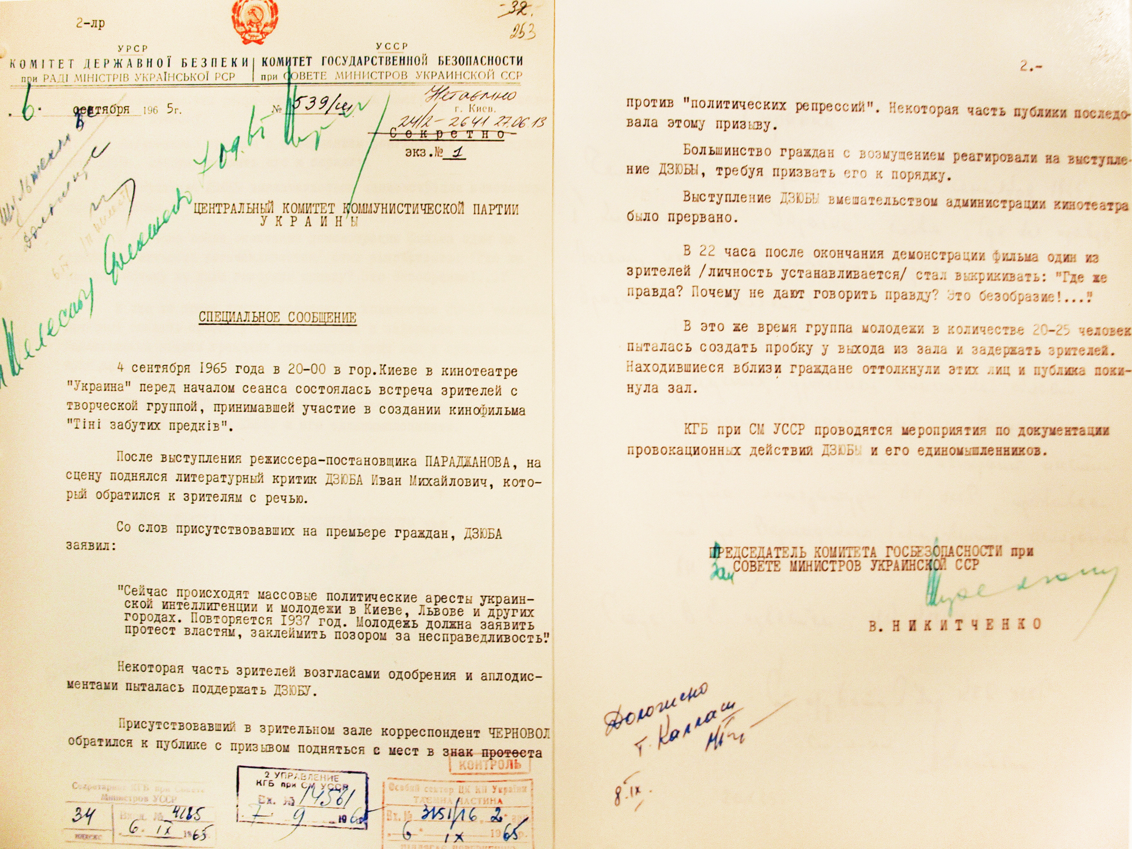 Спеціальне повідомлення КДБ УРСР про проведення політичної акції під час прем’єри фільму «Тіні забутих предків» у кінотеатрі «Україна» (Київ). 6 вересня 1965. Галузевий державний архів СБУ та Проект Мистецького Арсеналу «Тіні забутих предків. Виставка». Київ, 2016